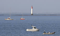 Le Phare de Chauveau, Rivedoux-Plage, pointe Sud de l'île de Ré, à 1200 mètre en mer, en arrière-plan l'îŽle d'Oléron. Cette image et issue de ma banque d'images personnelle